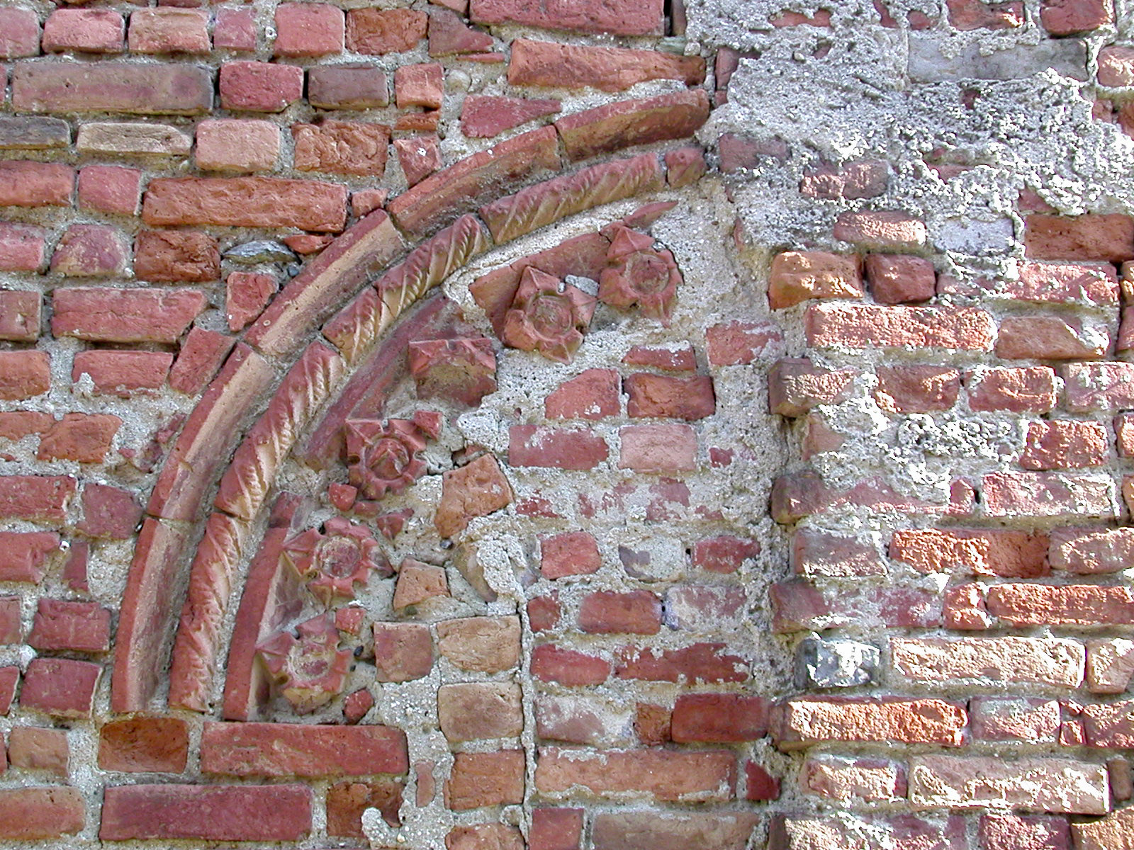 Pecetto (TO), resto di arco basso-medievale con decorazione in cotto. L'edificio risale alla fondazione di Pecetto, nel XIII secolo.